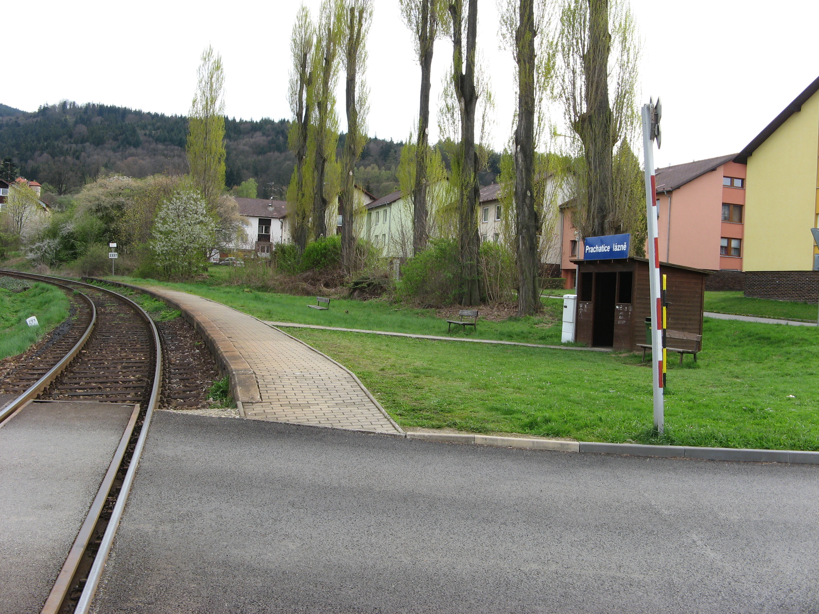 Železniční zastávka Prachatice lázně